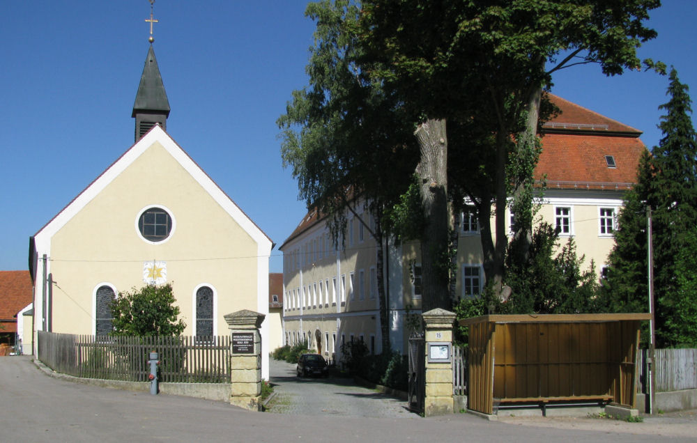 Schloss, heute Priesterseminar Herz-Jesu, dreigeschossiger Mansardwalmdachbau mit Eckrisaliten, Werksteinportalen und geohrten Fenstern, um 1730; mit Ausstattung; Reste der Schlosseinfahrt mit rustizierten Pfeilern, bauzeitlich.